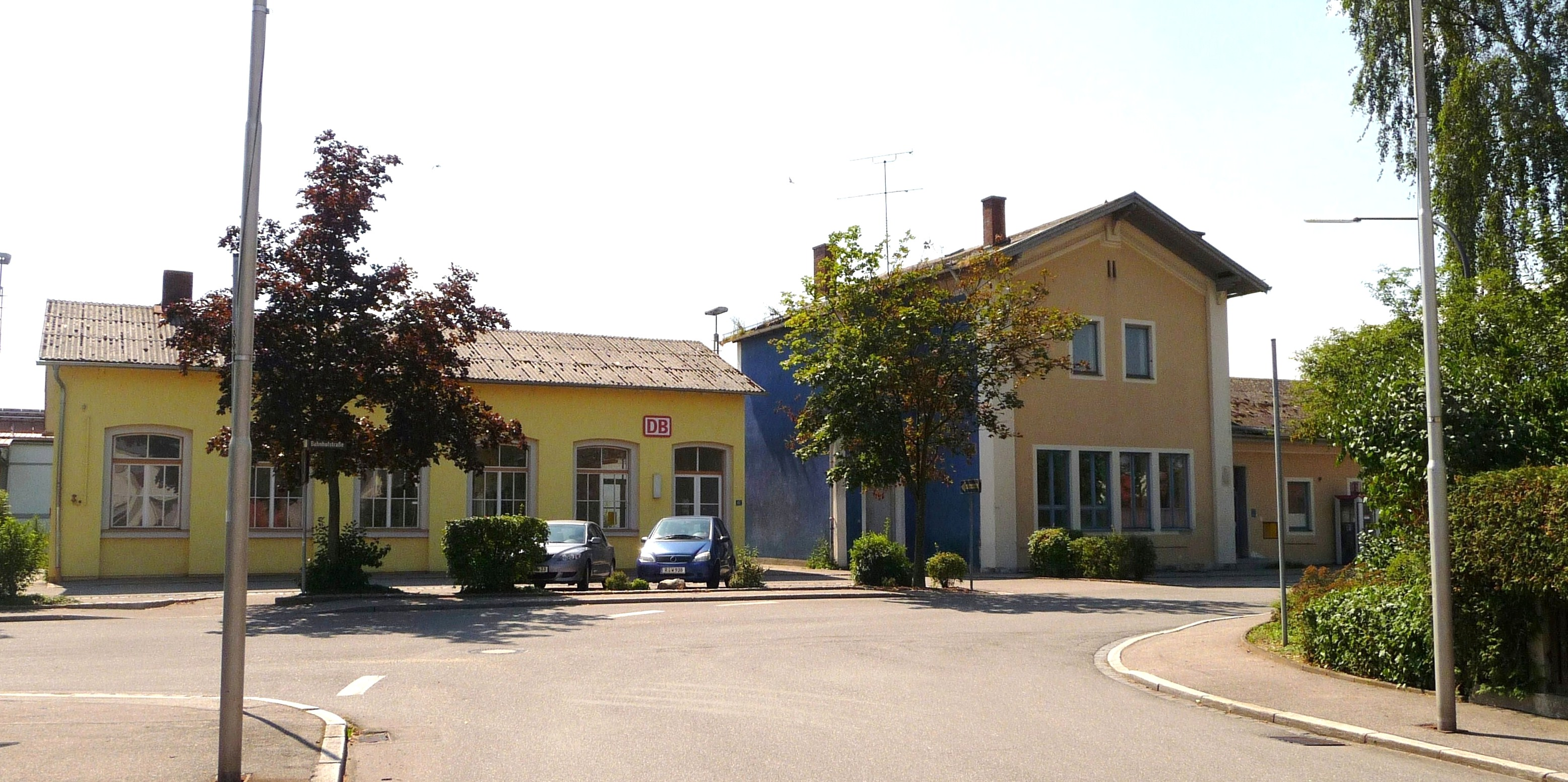 Der Bahnhof von Geiselhöring